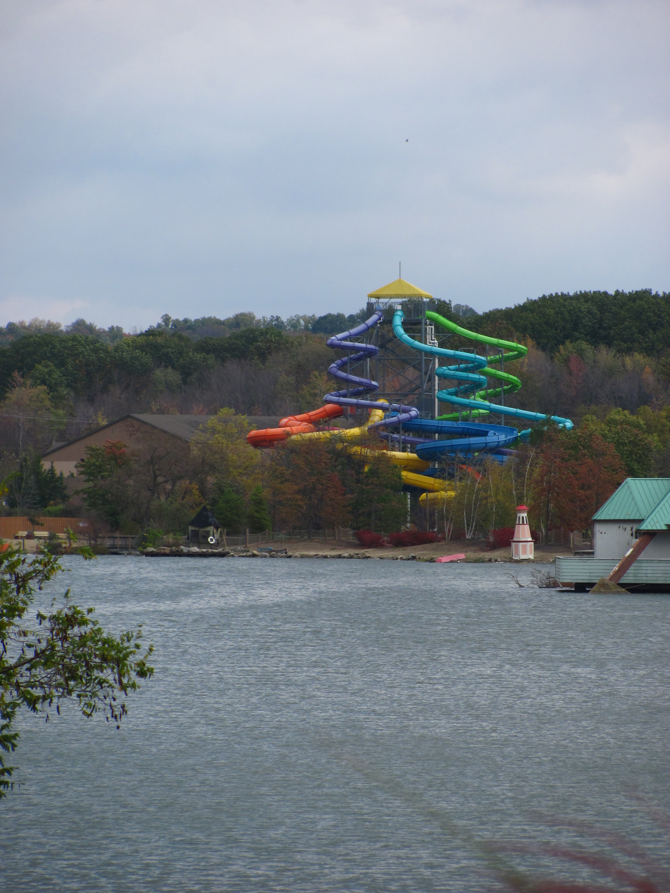 Geauga Lake 008